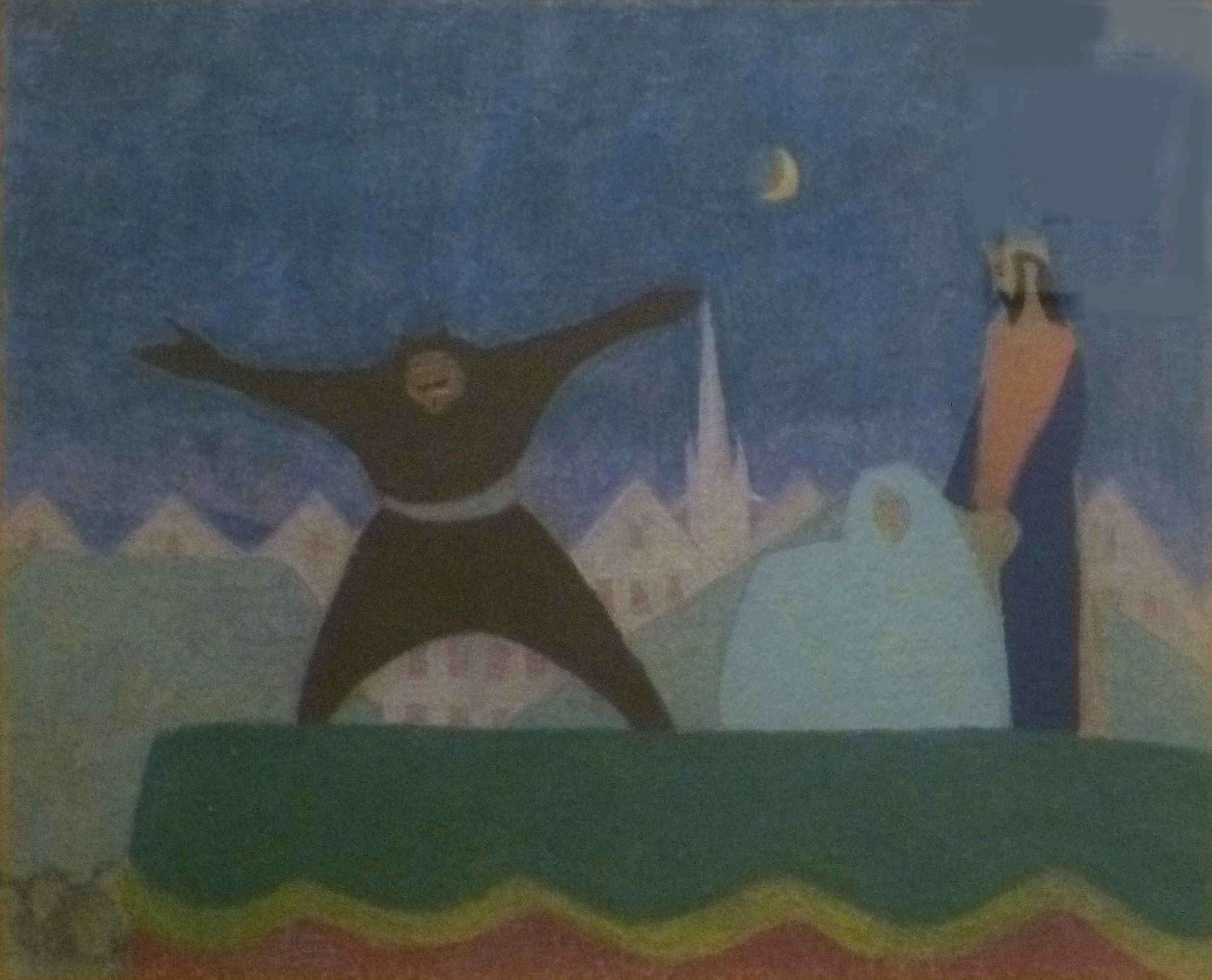 "Maskeroen", Illustratie voor "Mariken van Nieumeghen"; Oost-Indische inkt, kleurkrijt, contépotlood op papier (658 x 502 mm); privéverzameling